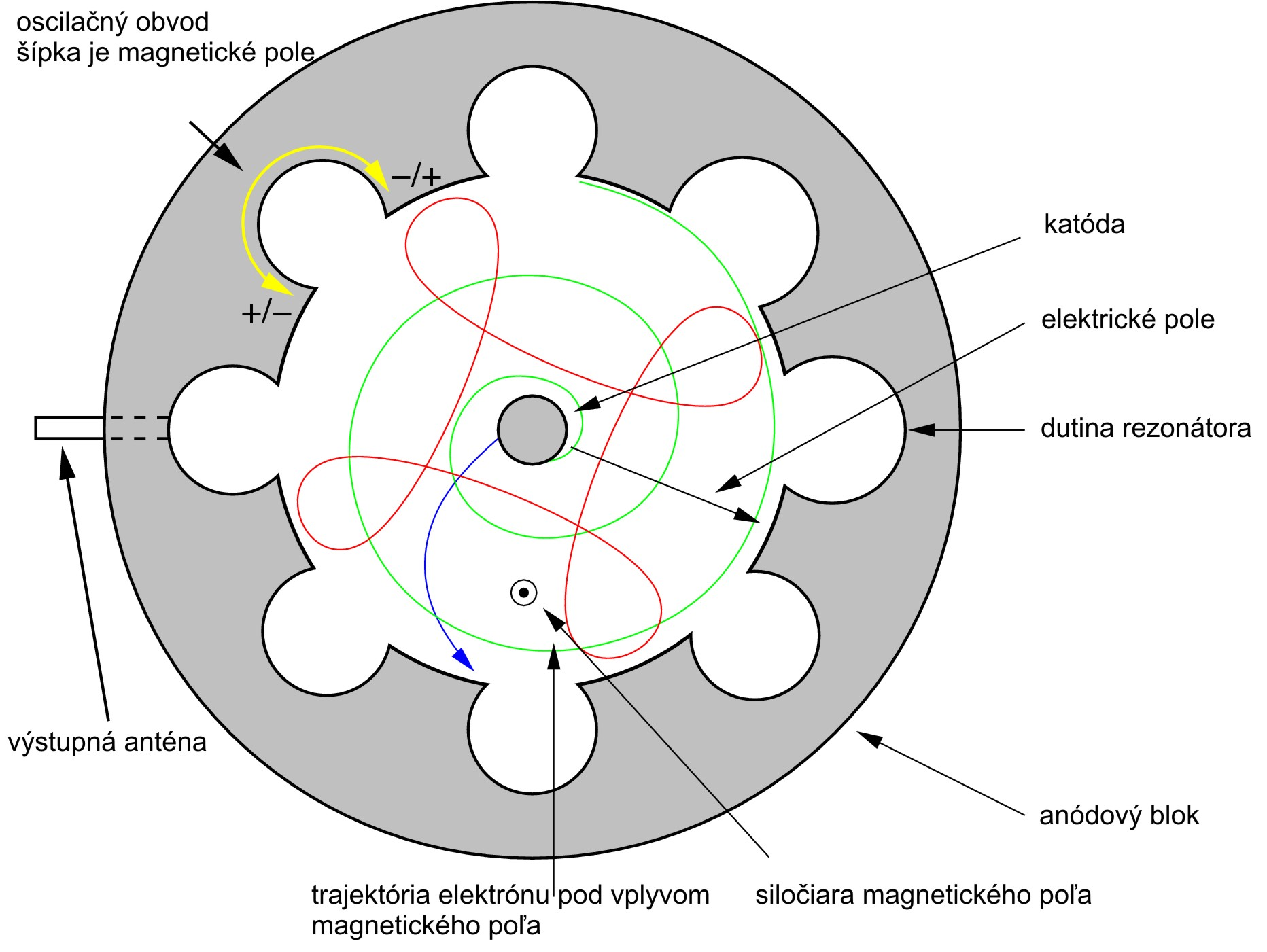 Magnetron